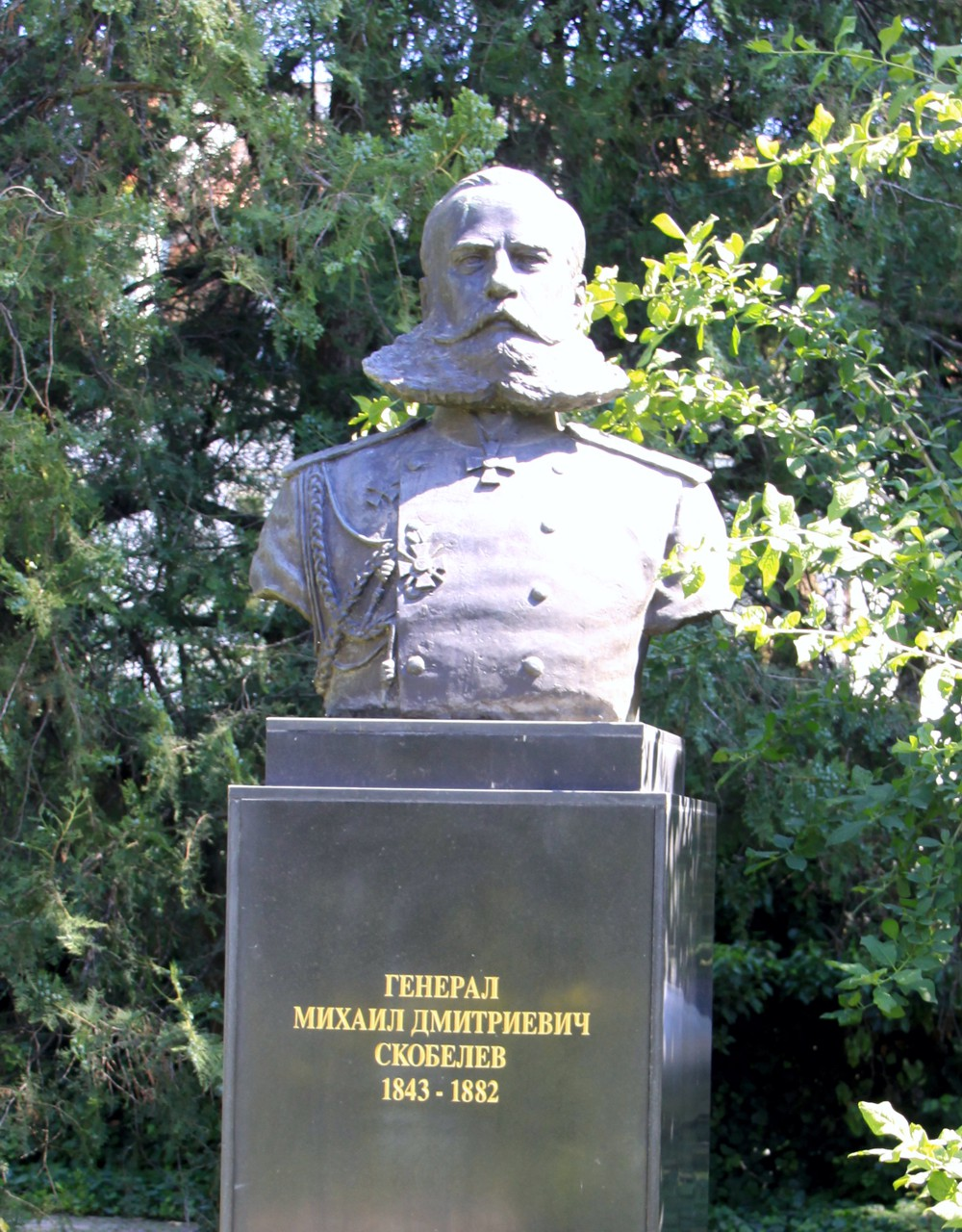 Памятник Михаилу Скобелеву в городе Плевен (Плевна), Болгария